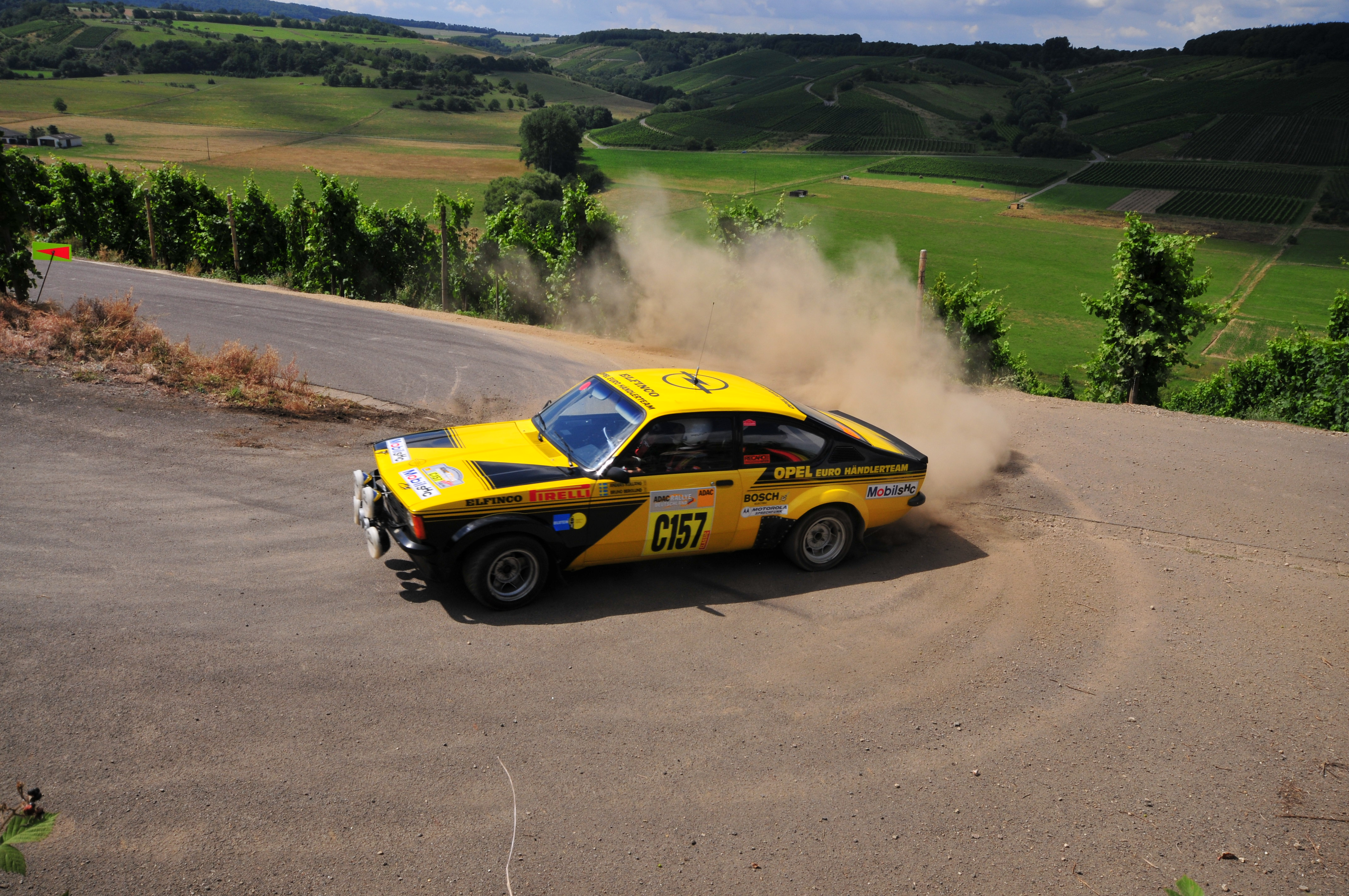 Anders Kulläng's Opel Kadett GT/E driven during the 2008 Rallye Deutschland.